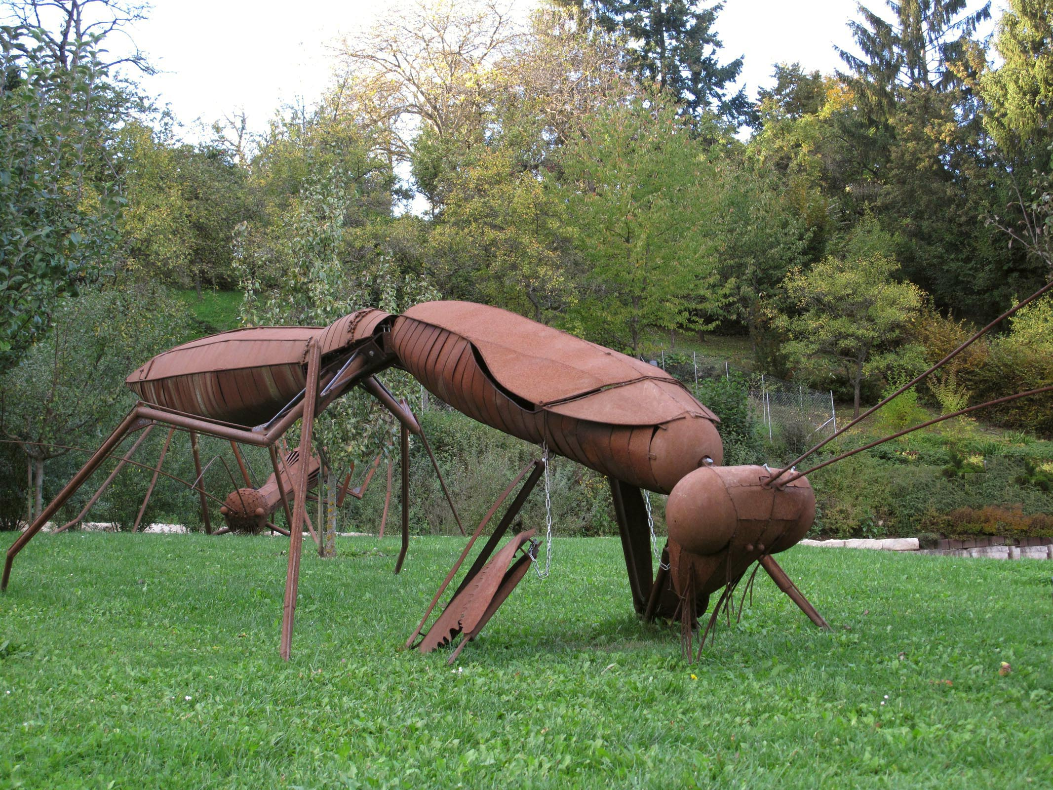 Andreas Enrique Furtwängler, Gottesanbeterin und Stabheuschrecke, 2008-09, Baden-Württemberg, Landkreis Böblingen, Weissach, Flachter Straße, Strudelbachhalle